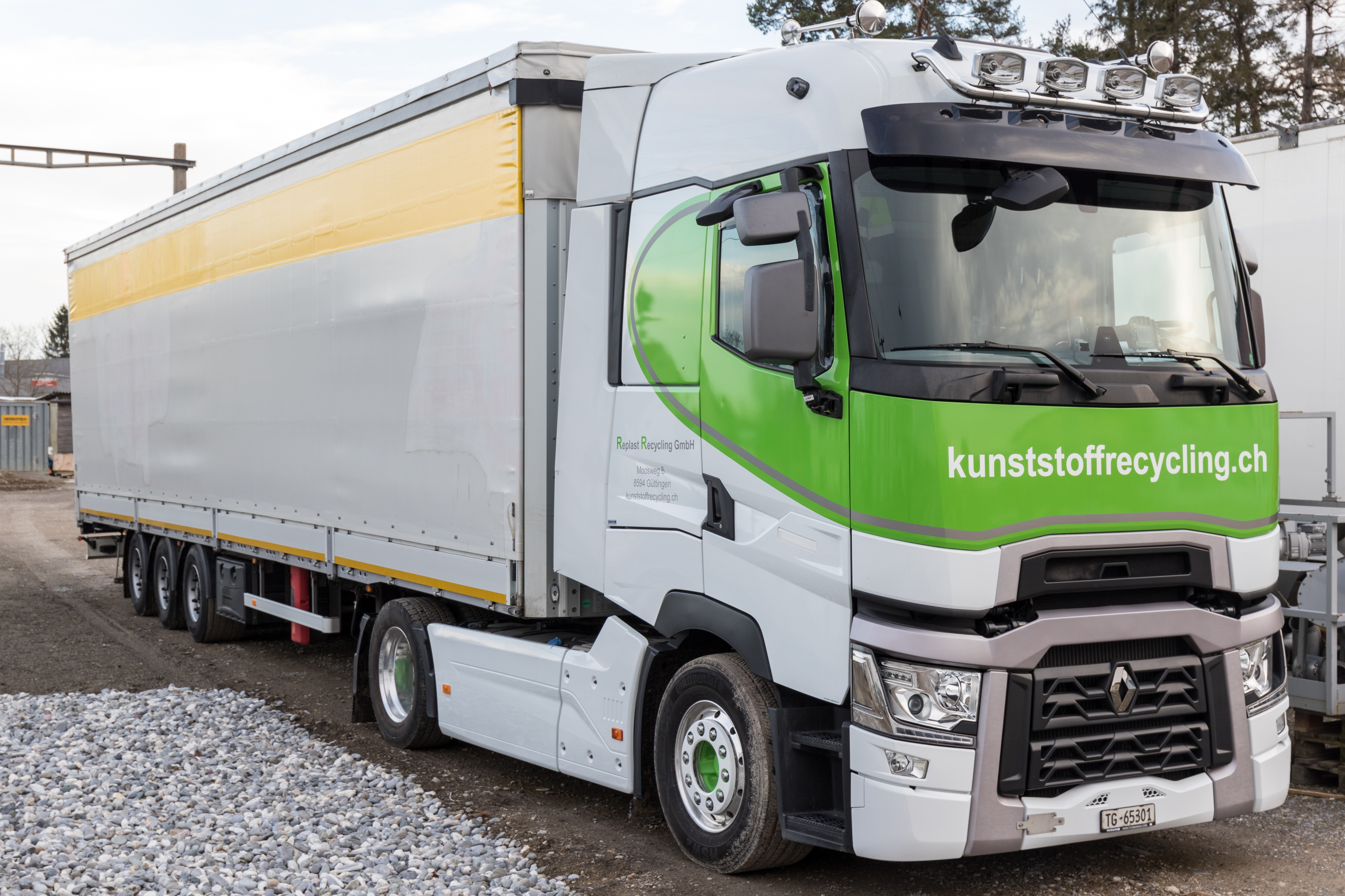 Renault T-Truck high